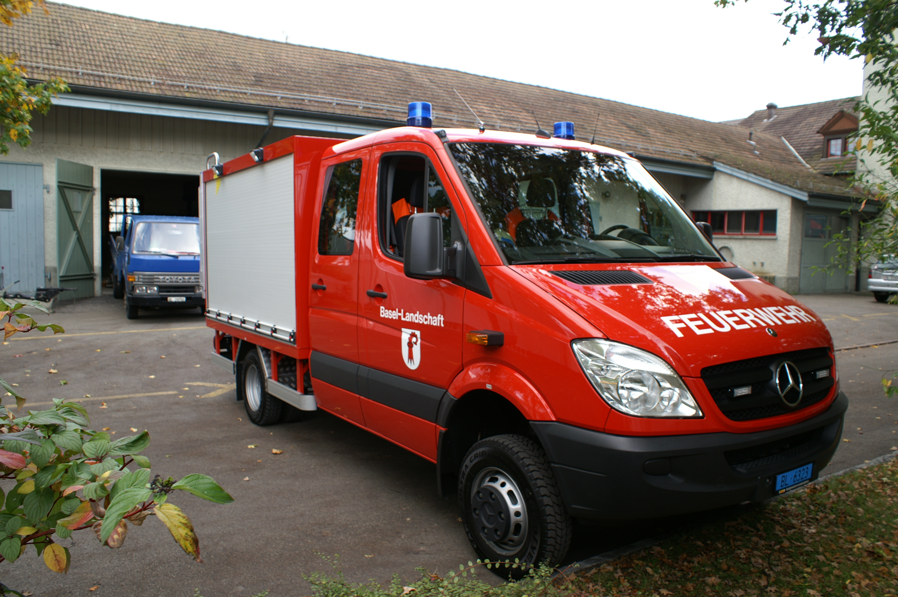 Strassenretter des Kanton Basel-Landschaft, Standort Pratteln